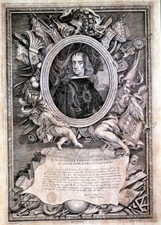 Gaspar Mendez de Haro, Marqés del Carpio, Virrey de Nápoles.